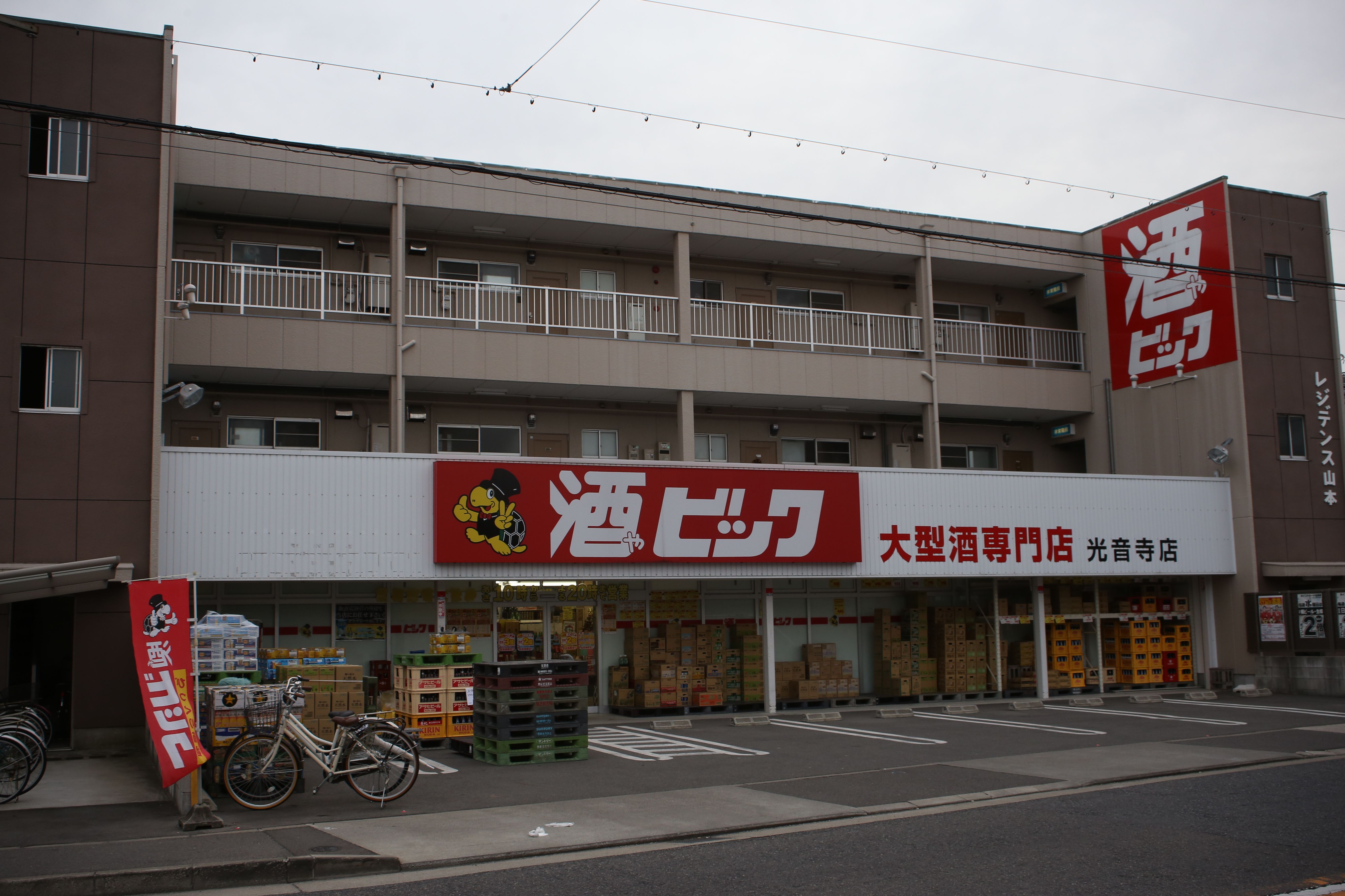 名古屋市北区中丸町の酒やビック光音寺店